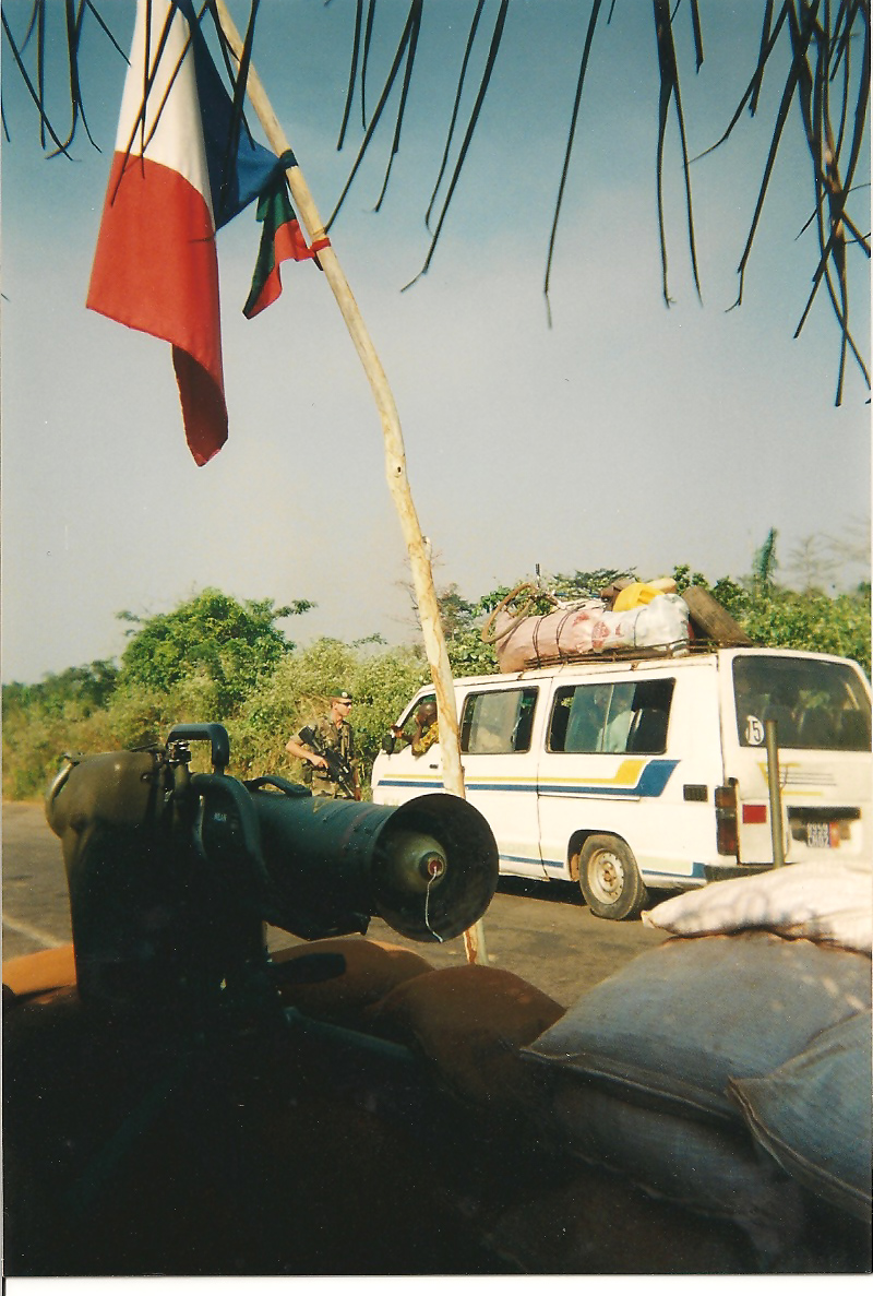 A francia idegenlégió által ellenőrzött terület (Elefántcsontpart, Bonoufla)